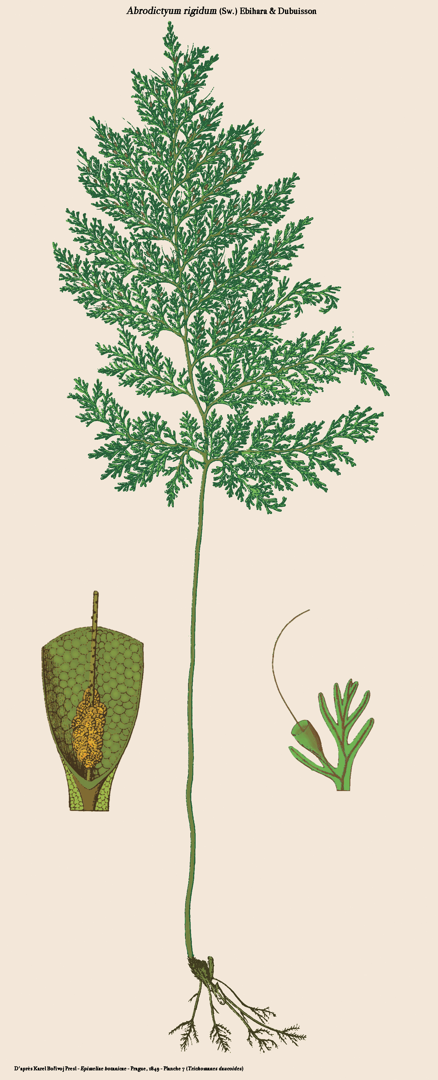 Trichomanes daucoides = Abrodictyum rigidum ; planche 7 de Epimeliae botanicae de C.Presl - Image reprise par D.Prévôt